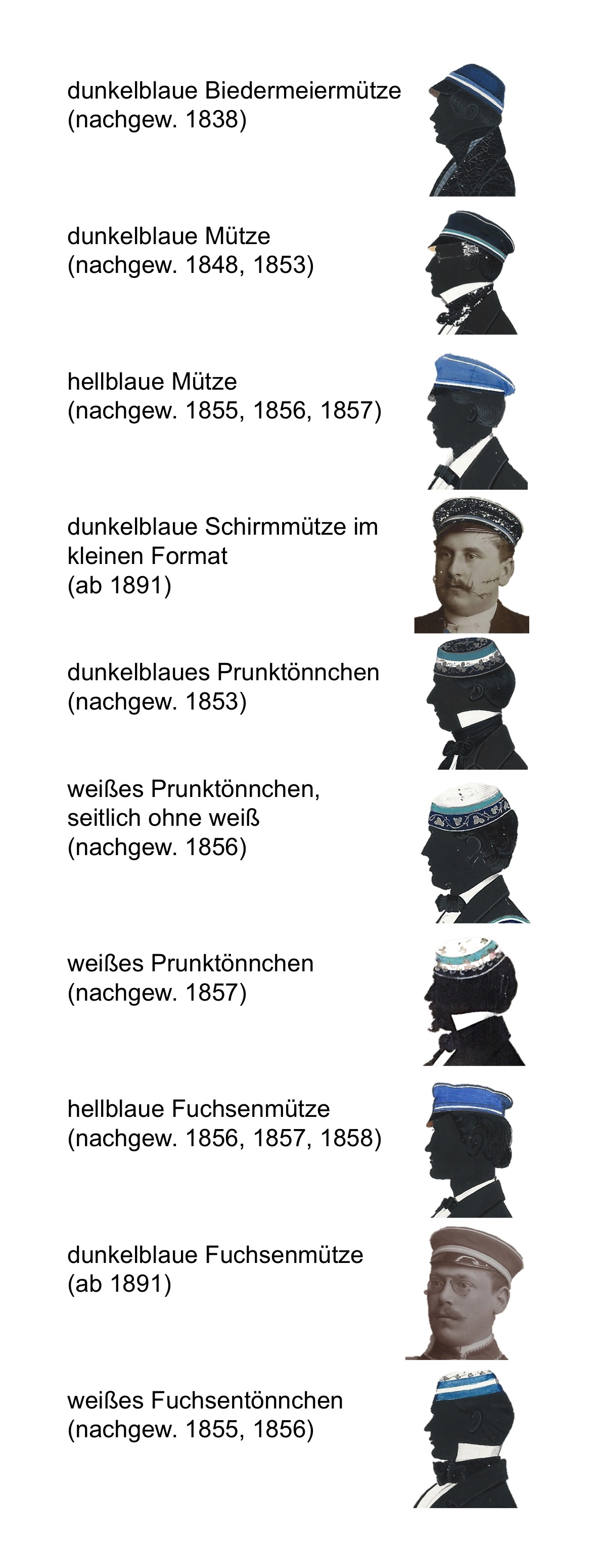 Übersicht über die zu verschiedenen Zeiten gebräuchlichen Kopfbedeckungen des Corps Saxonia Halle.